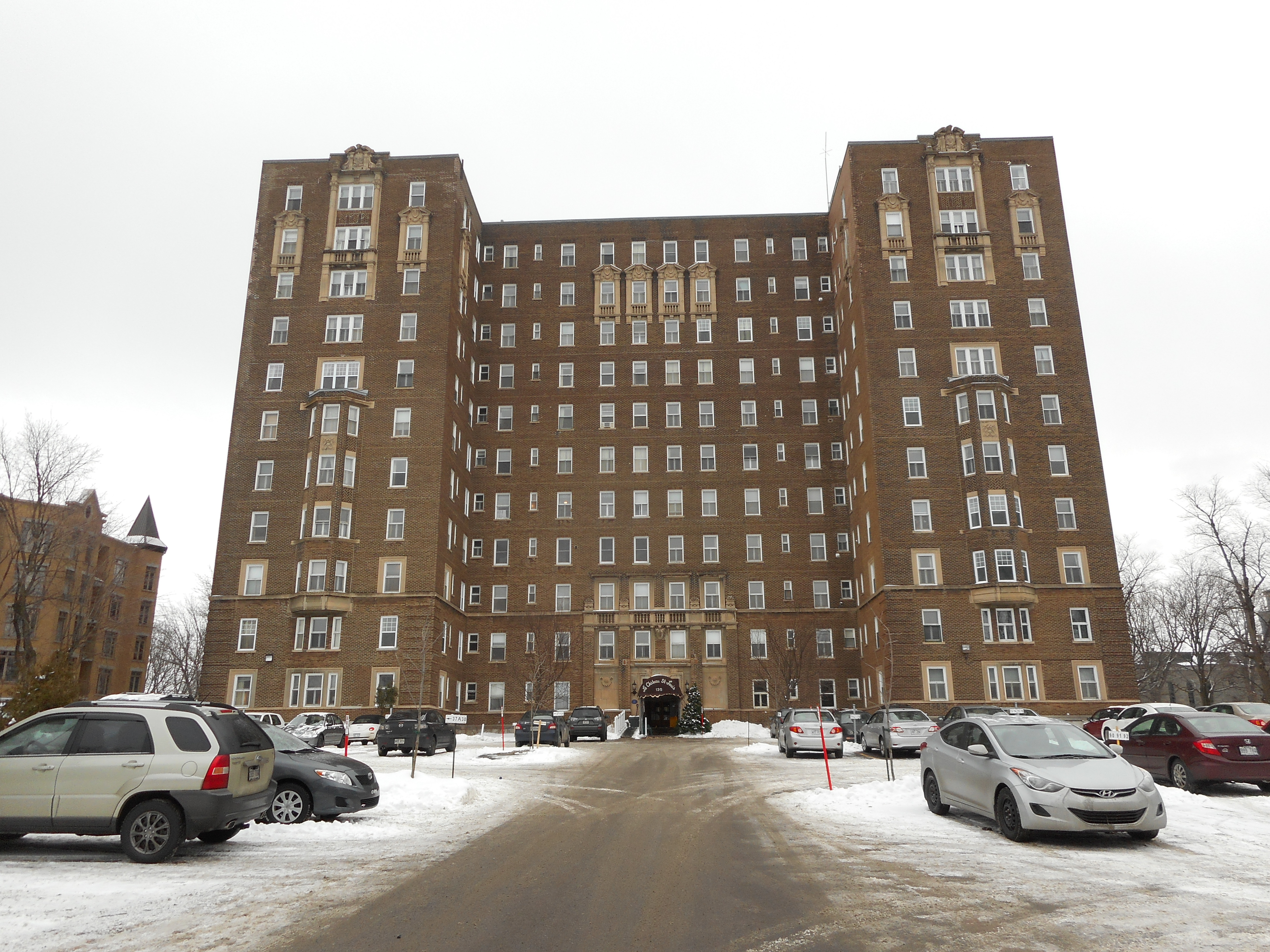 Château Saint-Louis, anciennement Quebec Appartments Ltd, 135, Grande Allée Ouest, construit en 1925 par l'architecte H.L. Fetherstonhaugh (1887-1971). L'immeuble, dont le plan est en H, comprend quelque 70 logements.